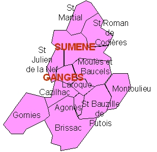 Communauté de communes des Cévennes Gangeoises et Suménoises (carte)